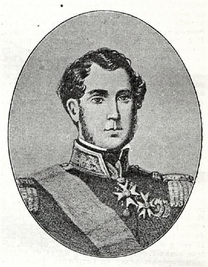 Данное фото было использовано в статье «Гамелен, Жан-Феликс-Эммануэль, барон» опубликованной в седьмом томе «Военной энциклопедии», который был издан книгоиздательским товариществом И. Д. Сытина в 1912 году в столице Российской империи городе Санкт-Петербурге.